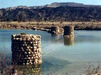 عكس ترنه دهستان كوخرد بخش كوخرد